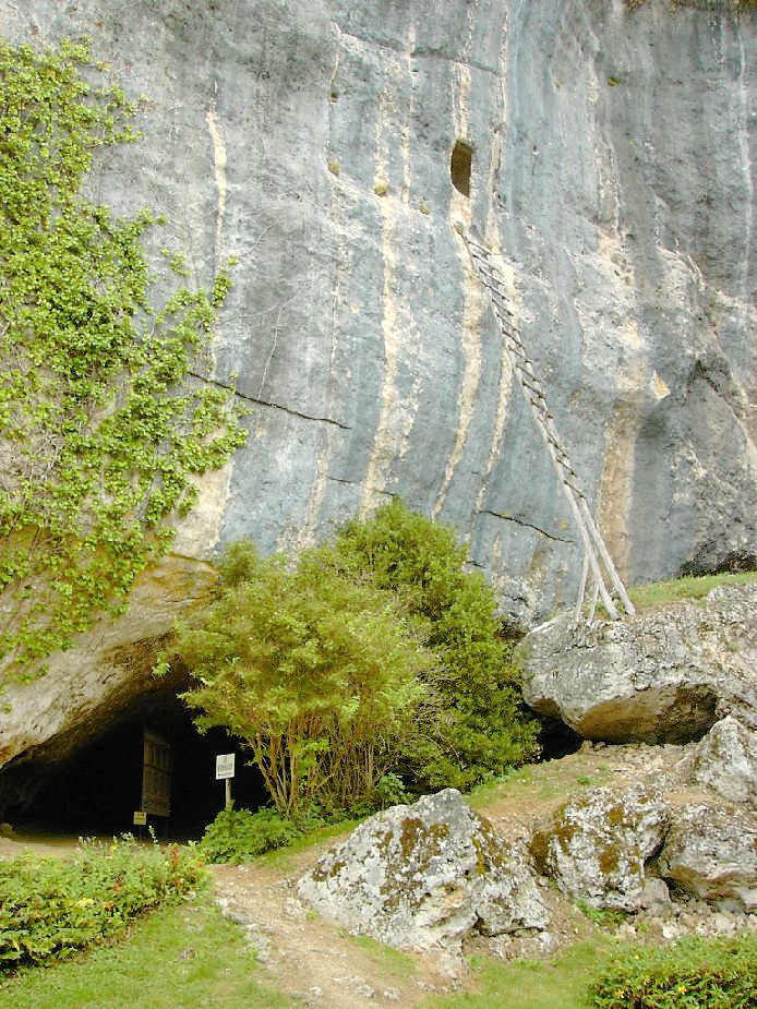 Abri de Laugerie-Basse, Les Eyzies-de-Tayac-Sireuil en Dordogne .